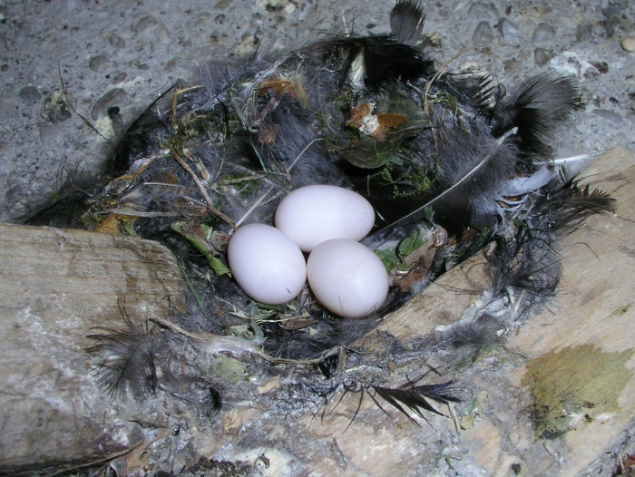 Sarlósfecske fészekalja (Sopron)